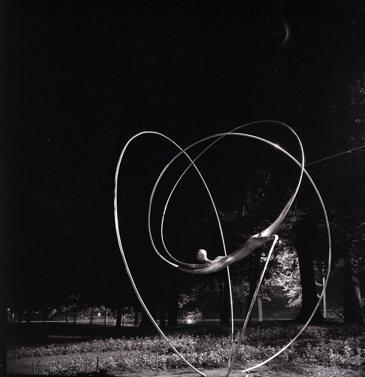 Servizio fotografico : Milano, 1963 / Paolo Monti. - Buste: 10, Fototipi: 10 : Negativo b/n, gelatina bromuro d'argento/ pellicola ; 6x6. - ((Serie costituita da 10 negativi identificati con i nn.: 19769-19778. Sulla busta del negativo R19769 manoscritto: "Carmelo Cappello". Numerazione parallela: 1022-1024, 1041-1042. La suddetta serie è contenuta nella scatola identificata con la numerazione R19619/837. Sul coperchio iscrizione manoscritta a pennarello: "Scultori". - Fonte: Rubrica di Paolo Monti: Archivio fino 1-4-1961/ 31-3-1963 (1961-1963), presso Archivio Paolo Monti